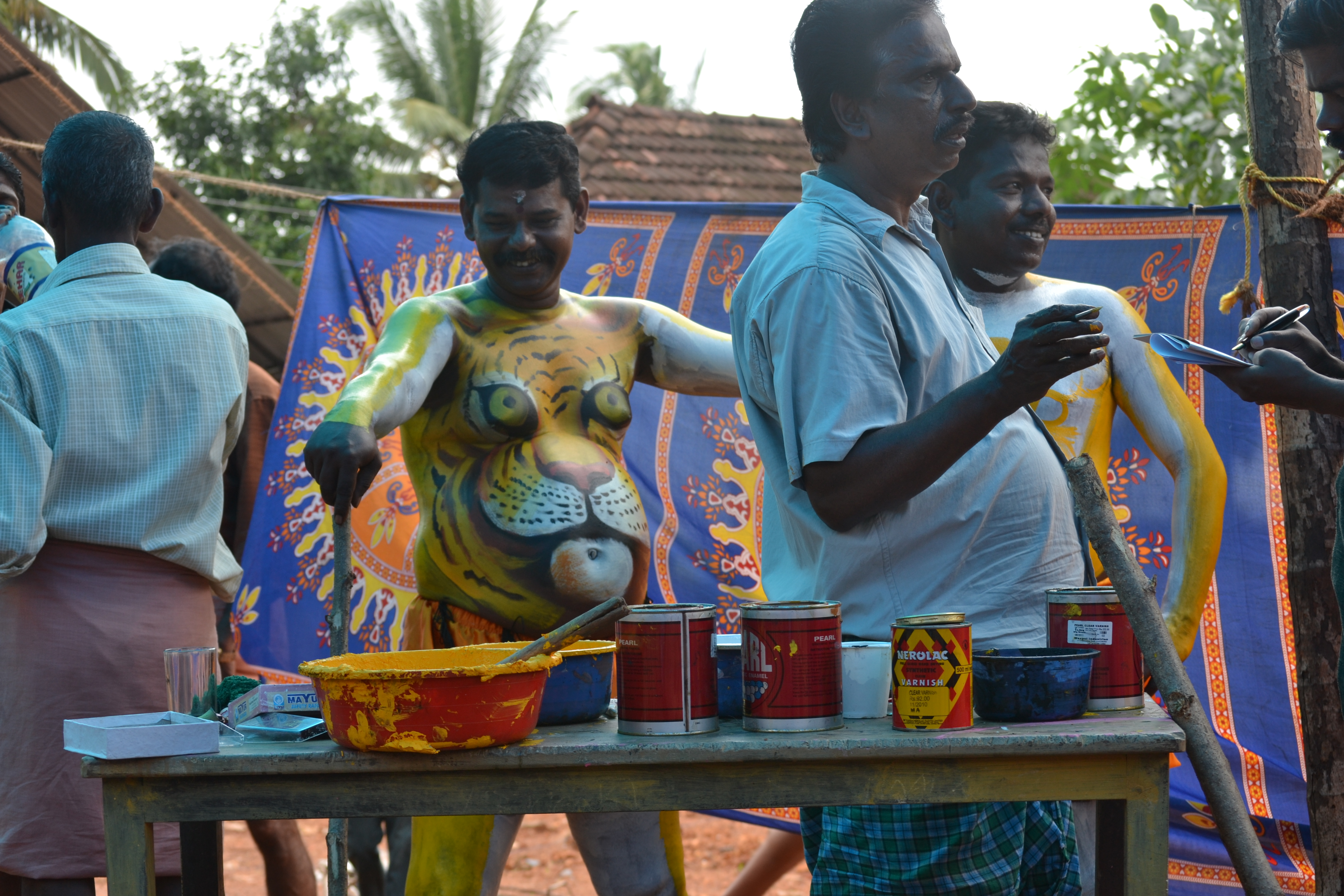 നാലോണദിവസം തൃശ്ശൂരിലെ പുലിമടകളില്‍നിന്നുള്ള ദൃശ്യങ്ങള്‍.